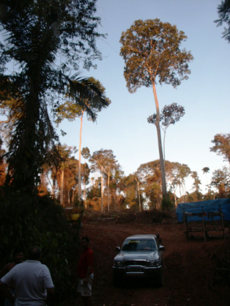 Brasil nuts tree (castanheira) near oriximina, PA, brasil